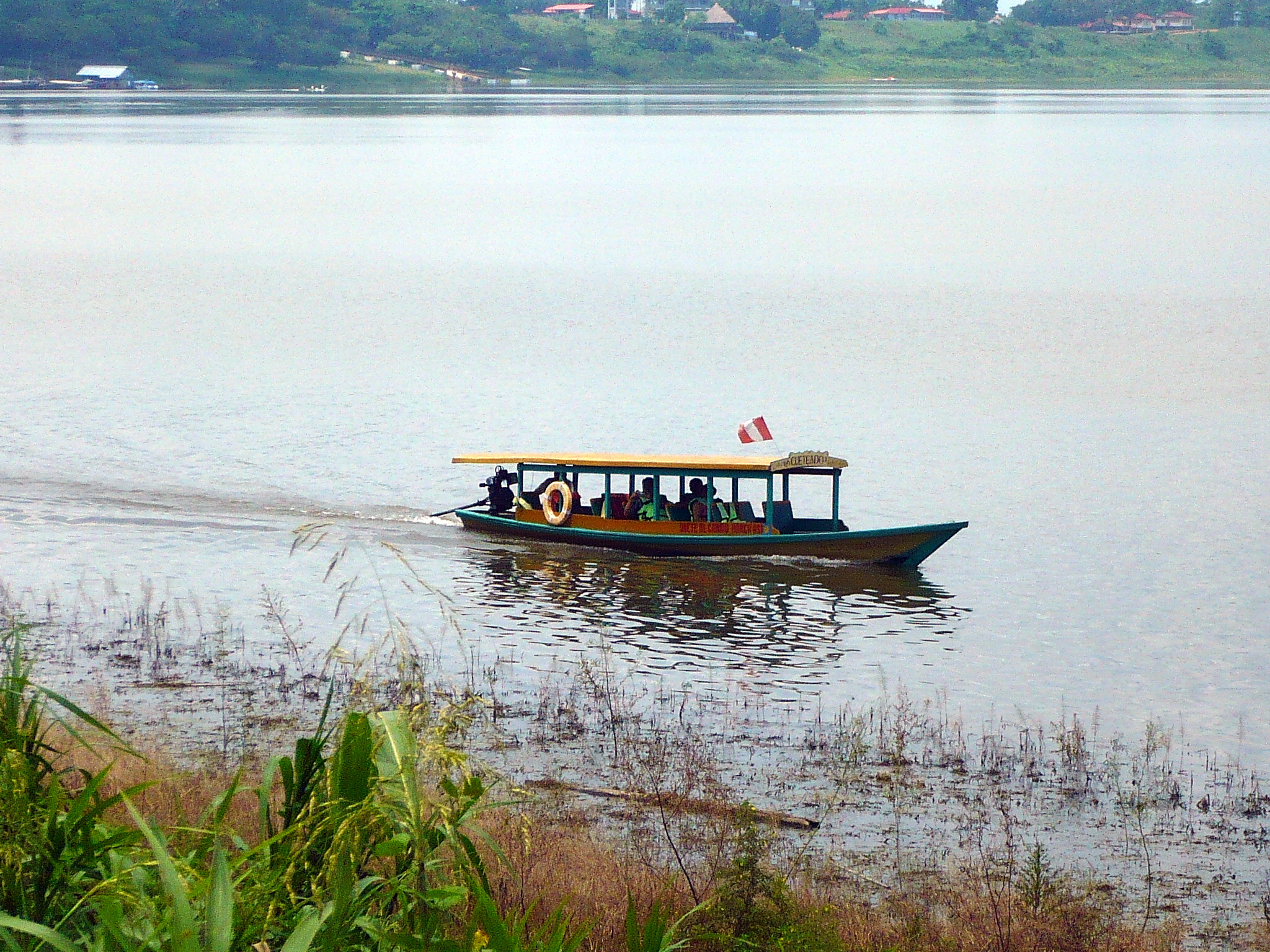 Un barco a motor, conocido como peke peke, en el laguna de Yarinacocha.